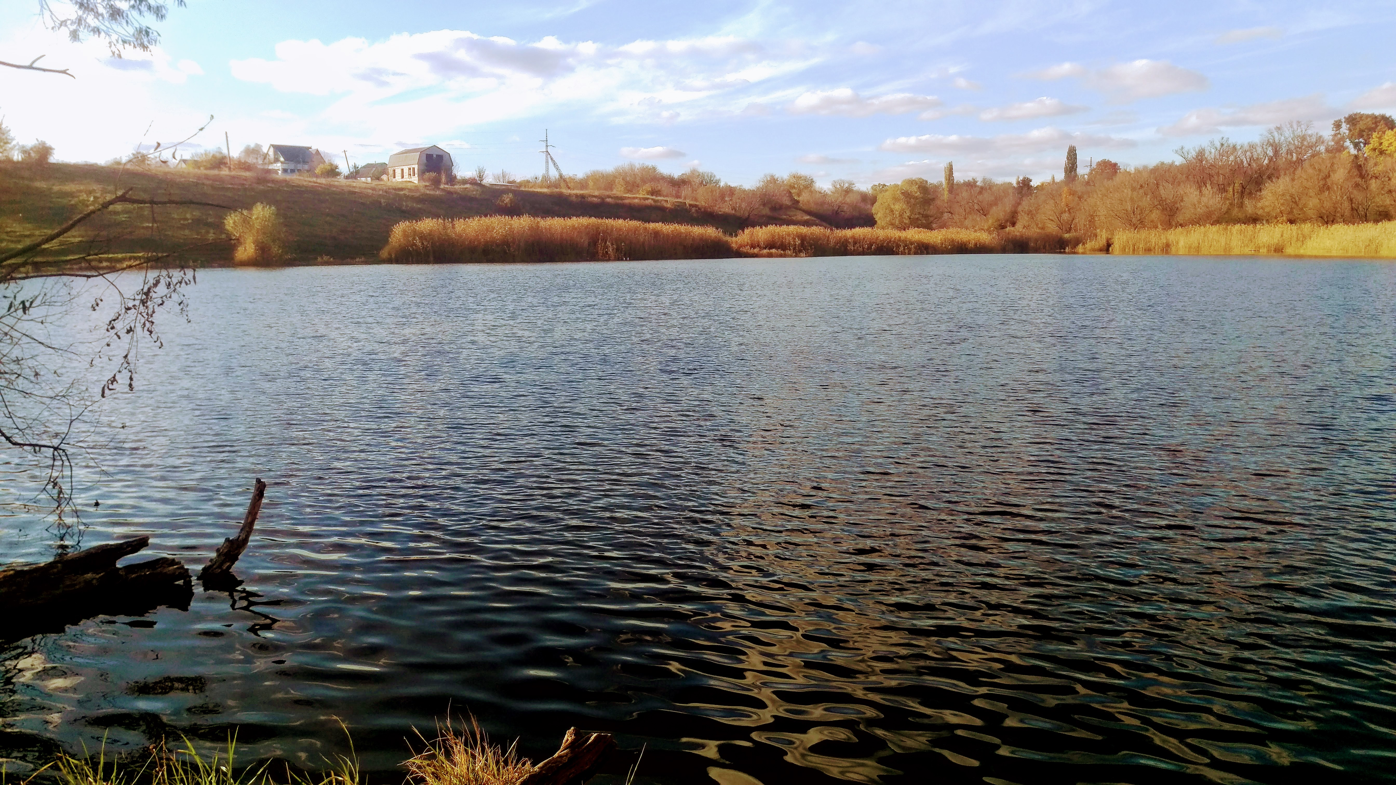 Пруд "Школьный" осенью